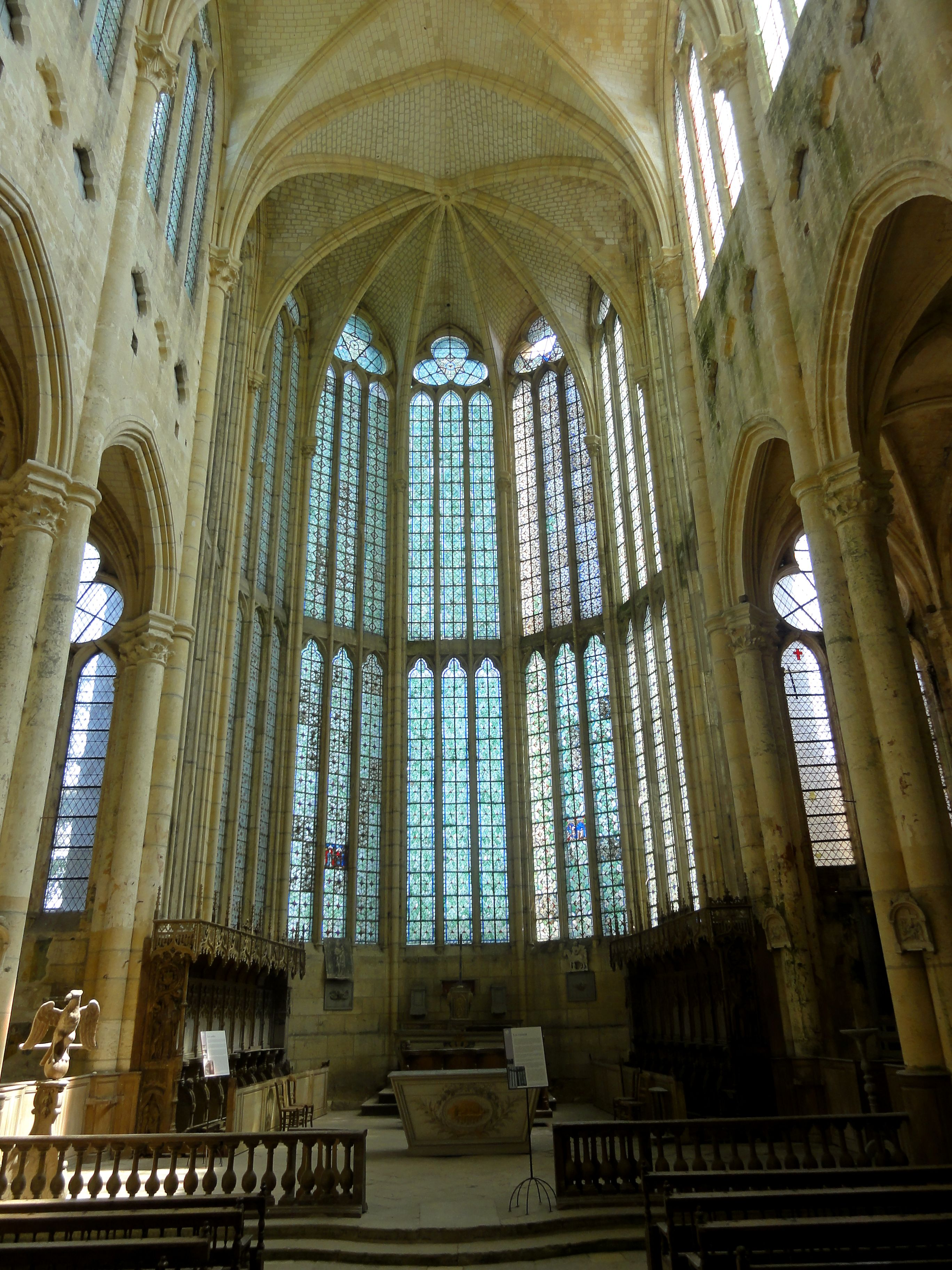 Abside.